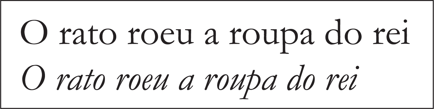 Diferenças entre o itálico e o romano da família Garamond